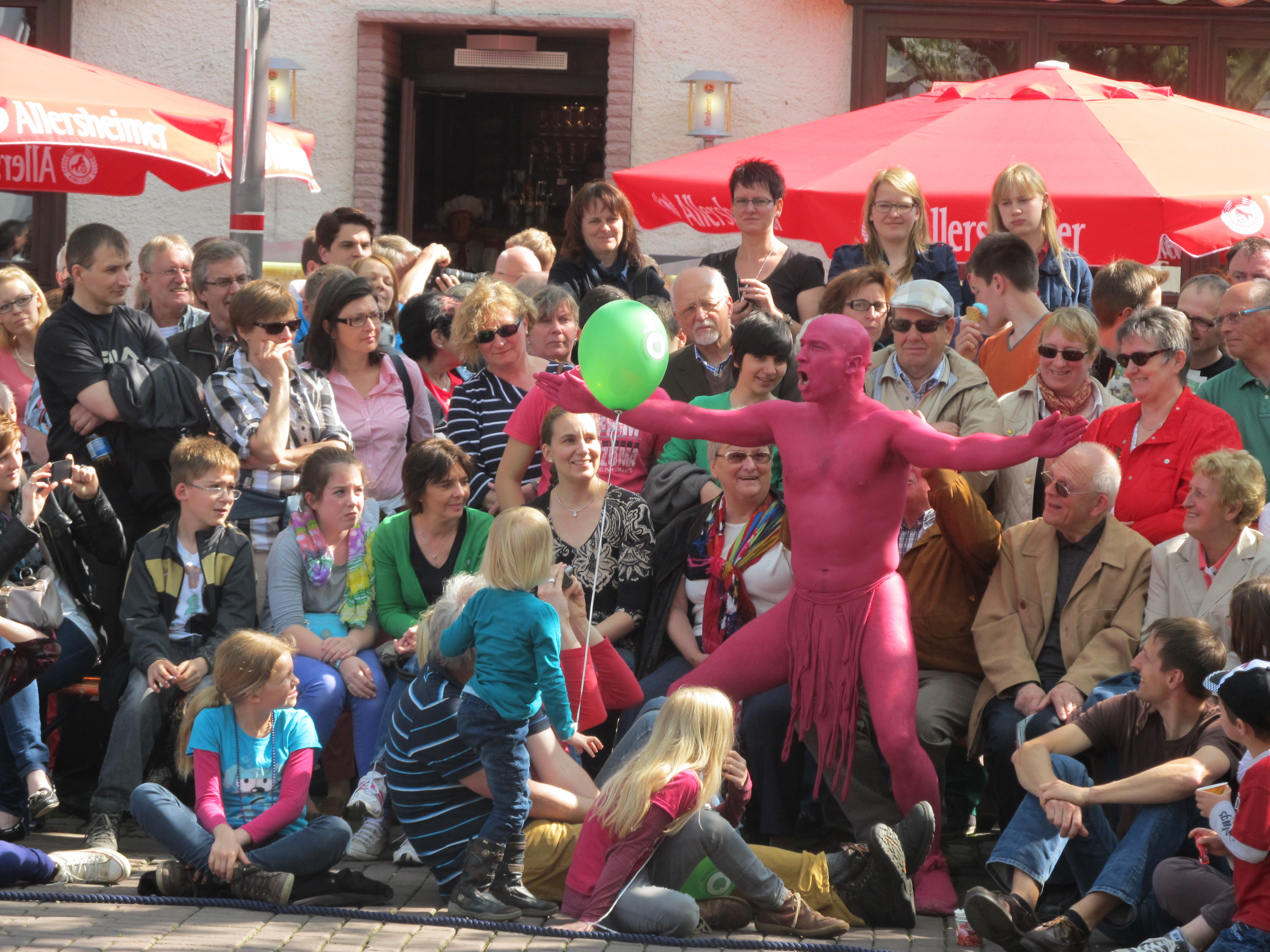 Die Theatergruppe Kud Ljud aus Slowenien mit dem Stück "Invasion" beim 12. Internationalen Straßentheterfestival in Holzminden 2013